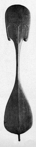 A Rapa Nui rapa, or ceremonial dance paddle.